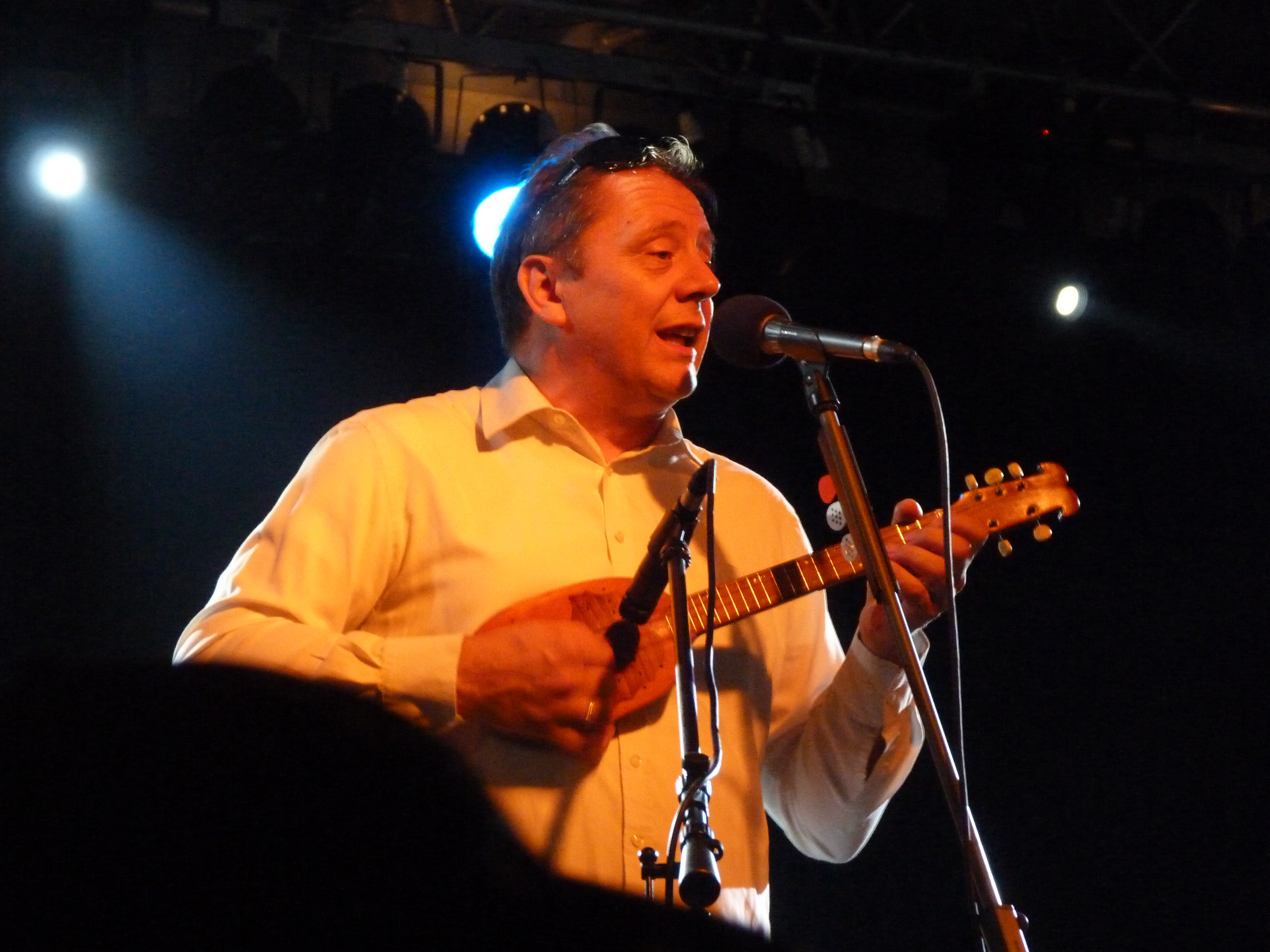 A felvétel 2014. augusztus 6-án készült Nagyharsányban. Focipálya. A Csík Zenekar koncertje. ©© Derzsi Elekes Andor, Budapest, 2014, A kép és filmfelvételek egészben, vagy részletekben másolását, bármilyen úton történő sokszorosítását és felhasználását a szerző ellenérték nélkül, jogutódjaira is kihatóan megengedi. Az engedély kiterjed a kereskedelmi célú hasznosításra is. Kéri azonban nevének feltüntetését a felhasználás során. A Metapolisz sorozat valamennyi képe és filmje Creative Commons alatti valamint kereskedelmi - for profit - célra is felhasználható. Ajánlott hivatkozás: Derzsi Elekes Andor: Metapolisz DVD line